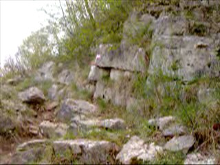 Il Varco della lupa,una delle tappe nella mulattiera